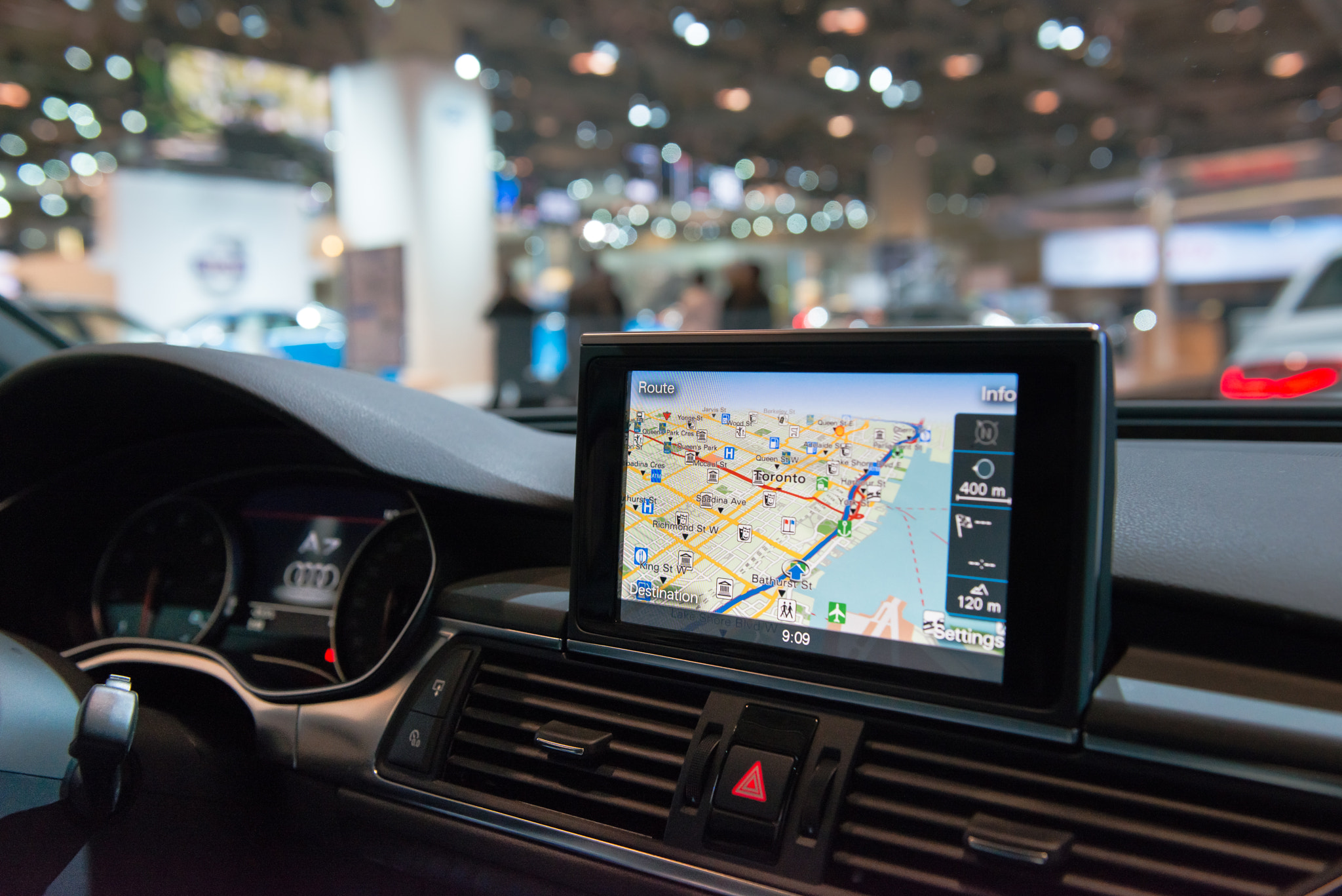 500px provided description: Audi A7 Interior [#car ,#interior ,#autoshow ,#audi ,#a7]